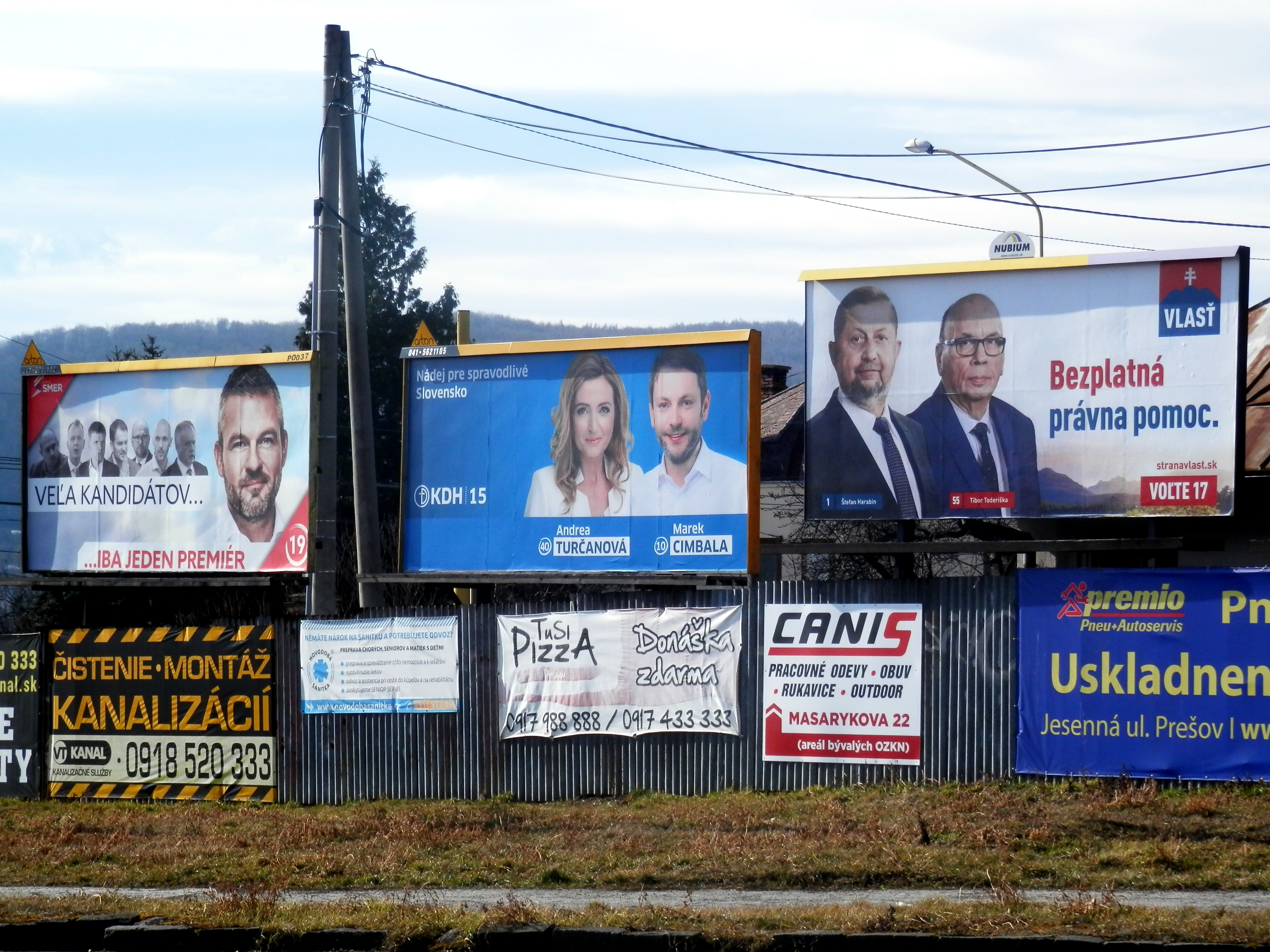 29.2.2020. Voľby do Národnej rady Slovenskej republiky..Bilbord, ulica armádneho generála Svobodu, Sekčov. Mesto Prešov. Slovensko.